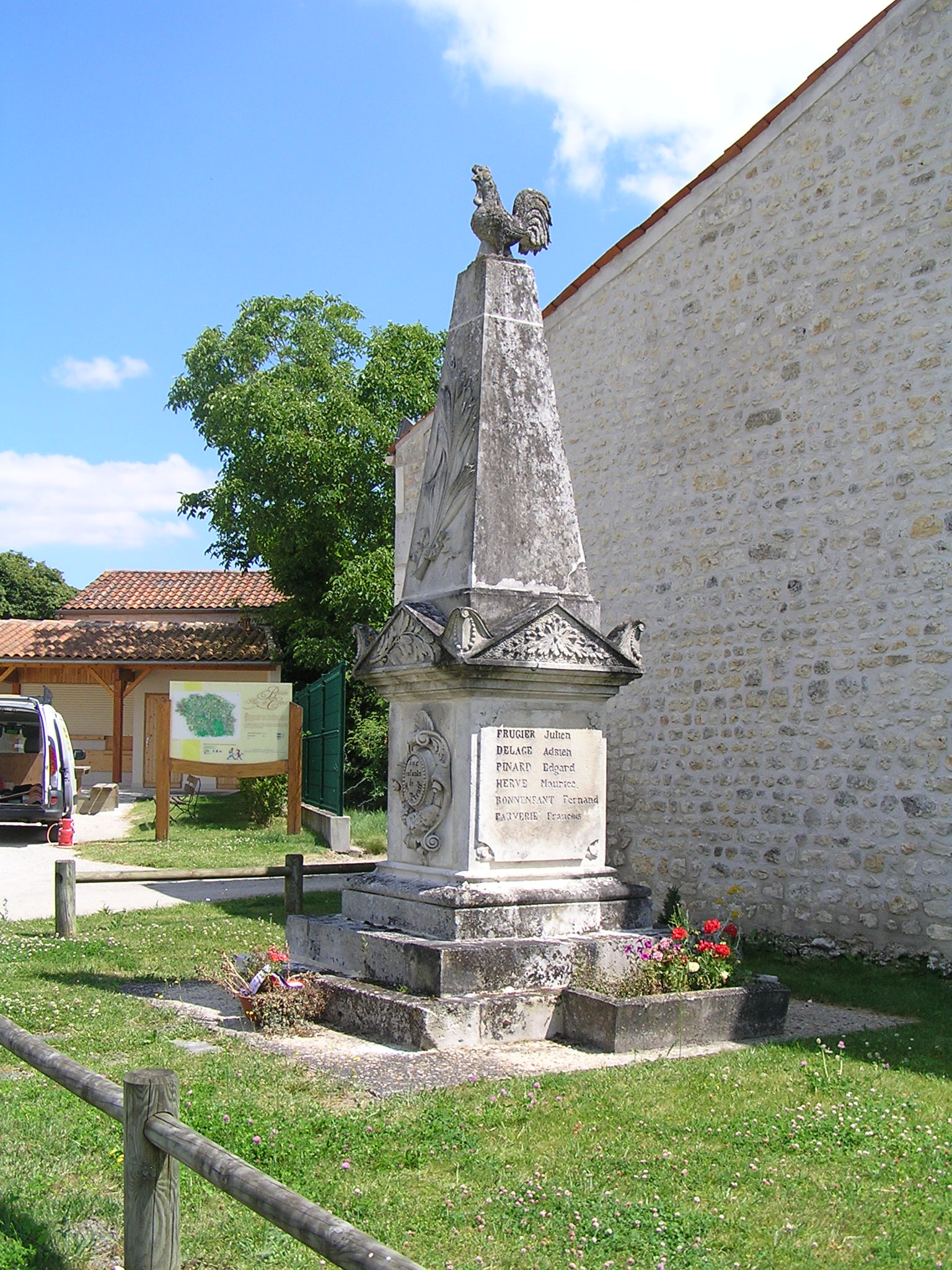 monument aux morts de Saint-Preuil